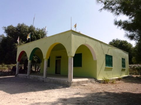 Alon Valley part of Oren Wadi. Mount Carmel, Israel בקעת אלון היא בקעה באפיק נחל אורן בהר הכרמל . הבקעה משתרעת מזרחית לעספיא ותחילתה באזור בו נשפך נחל חיק לנחל אורן בשנת 2003 נבנה באזור על ידי הדרוזים מבנה קטן המנציח את זכרה של "סית ח'דרה" (הגברת הירוקה) שהתגוררה בכפר זרעא וייעצה לתושבי הכפר בסוגיות מוסריות ודתיות